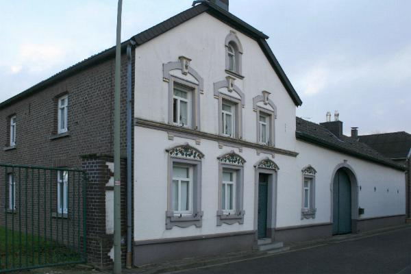 Wohnhaus in Wegberg-Flassenberg